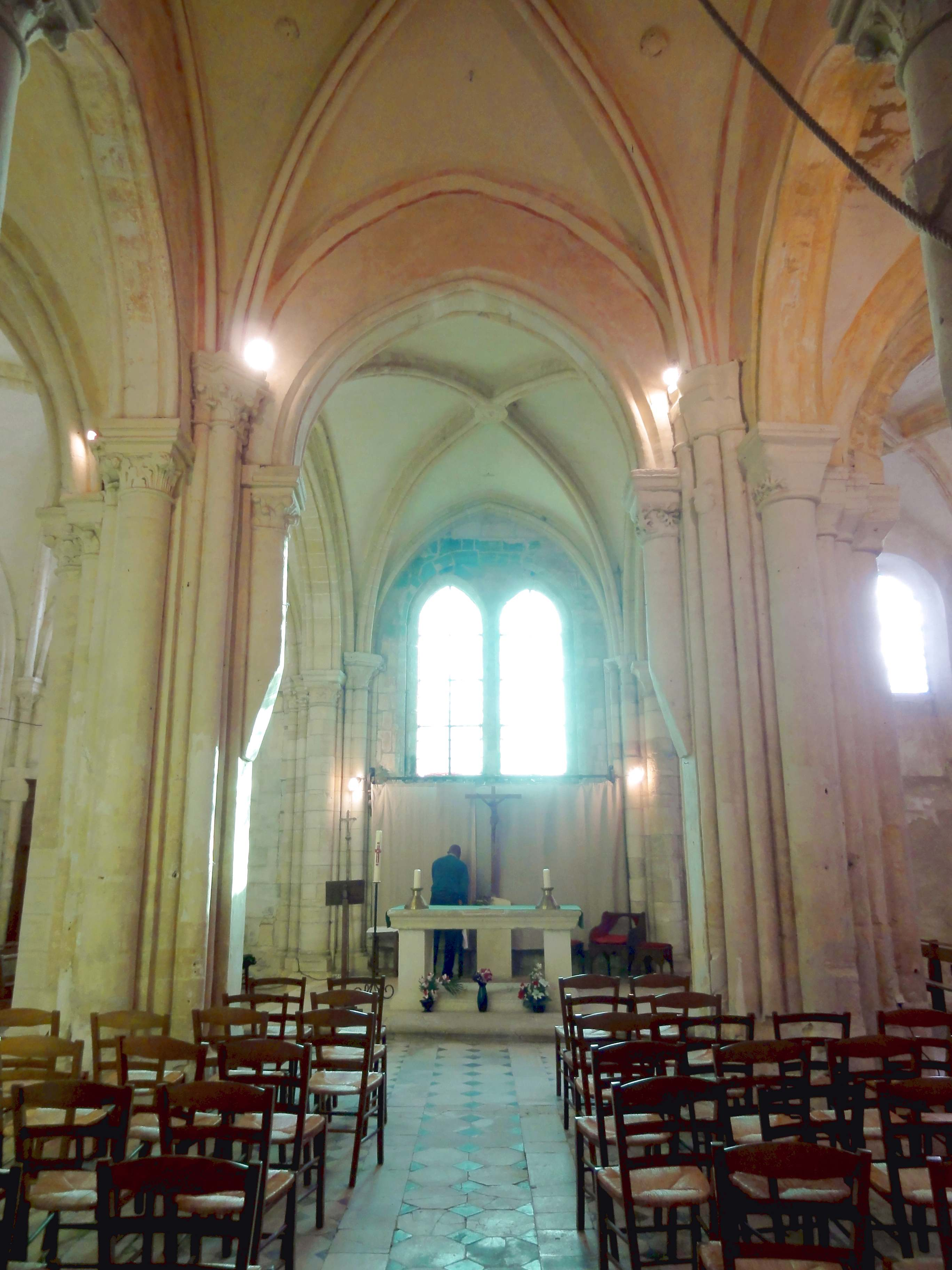 Intérieur de l'église - voir titre.